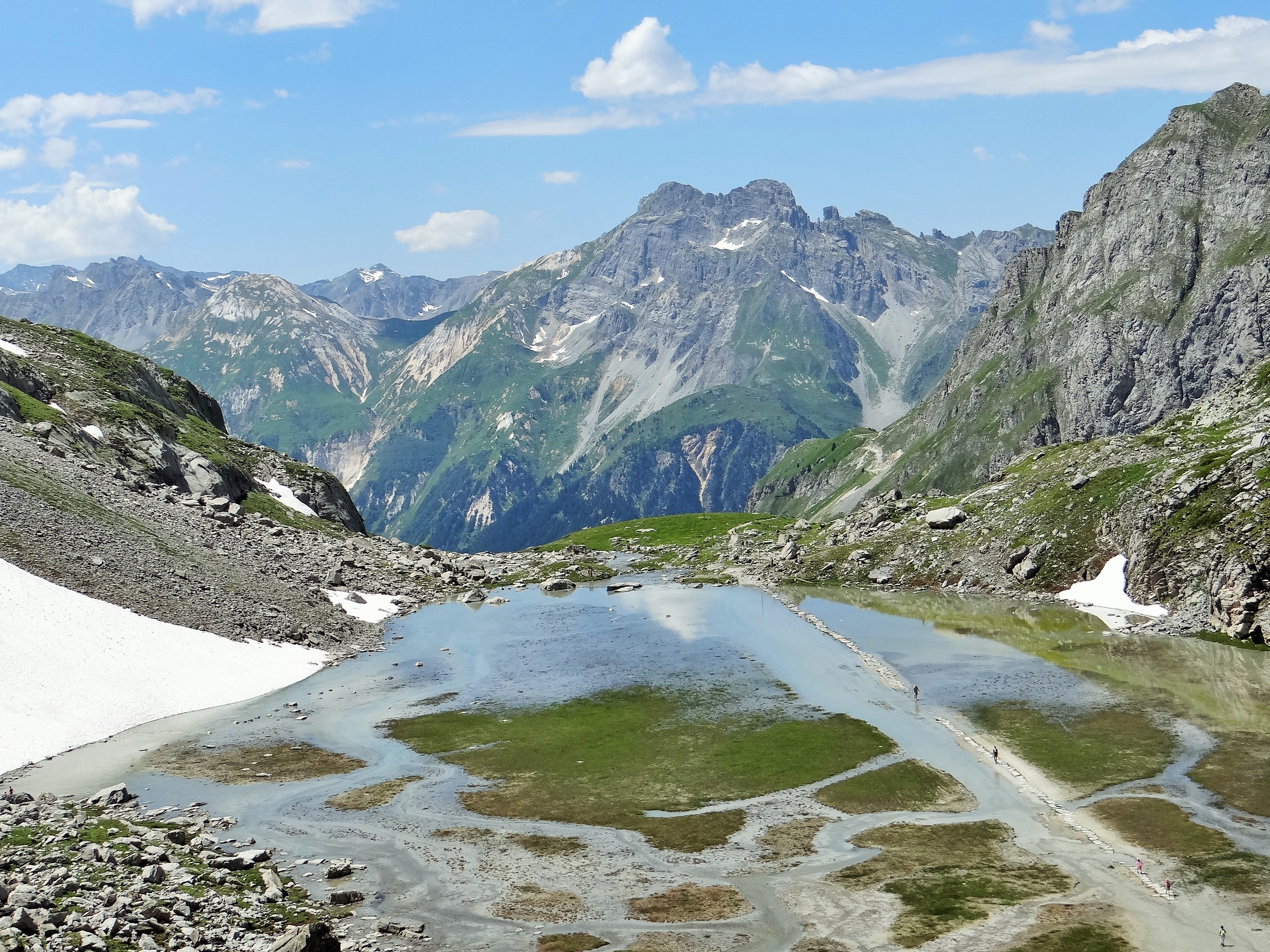 Parc national de la Vanoise